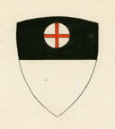 Stemma della famiglia Panciatichi